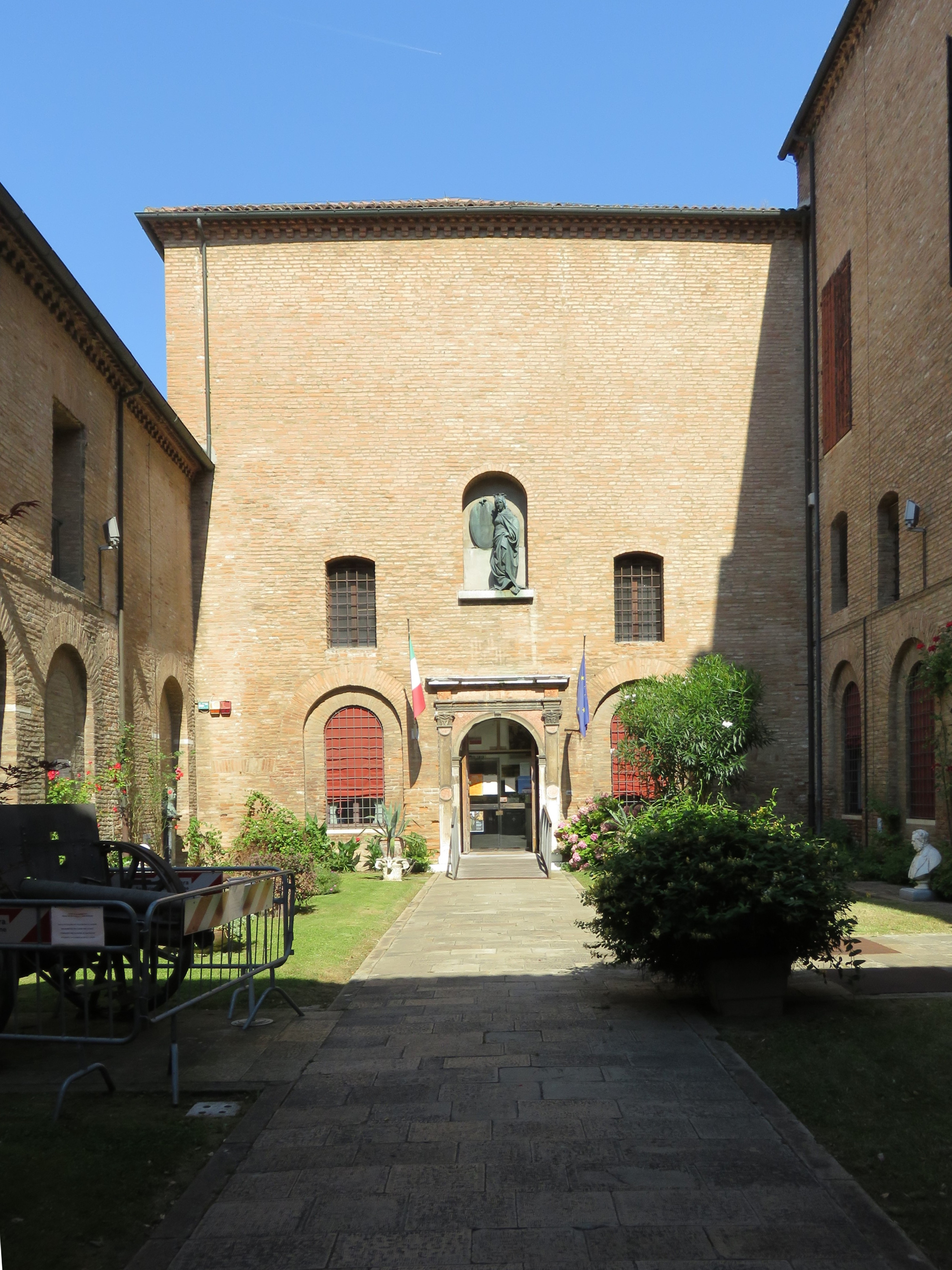 cortile, visione d'insieme